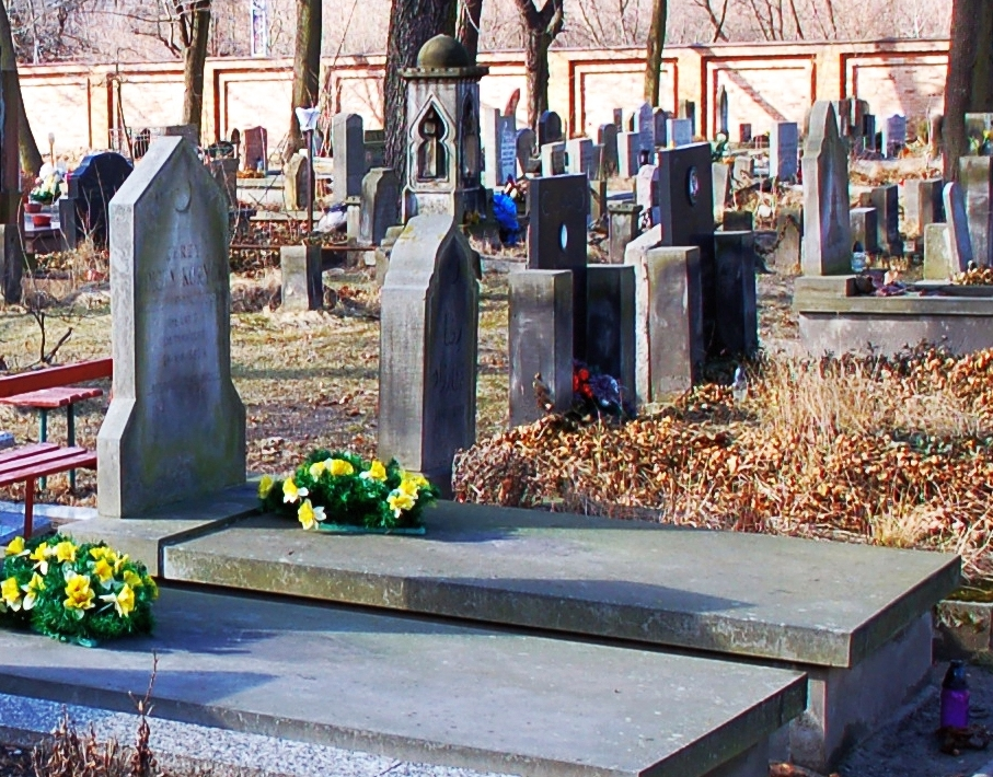 Tombstone of Jerzy Edigey Koricky (1912-1983), Polish-Tatar author, at Warsaw Muslim Tatar Cementry (Muzułmański Cmentarz Tatarski)